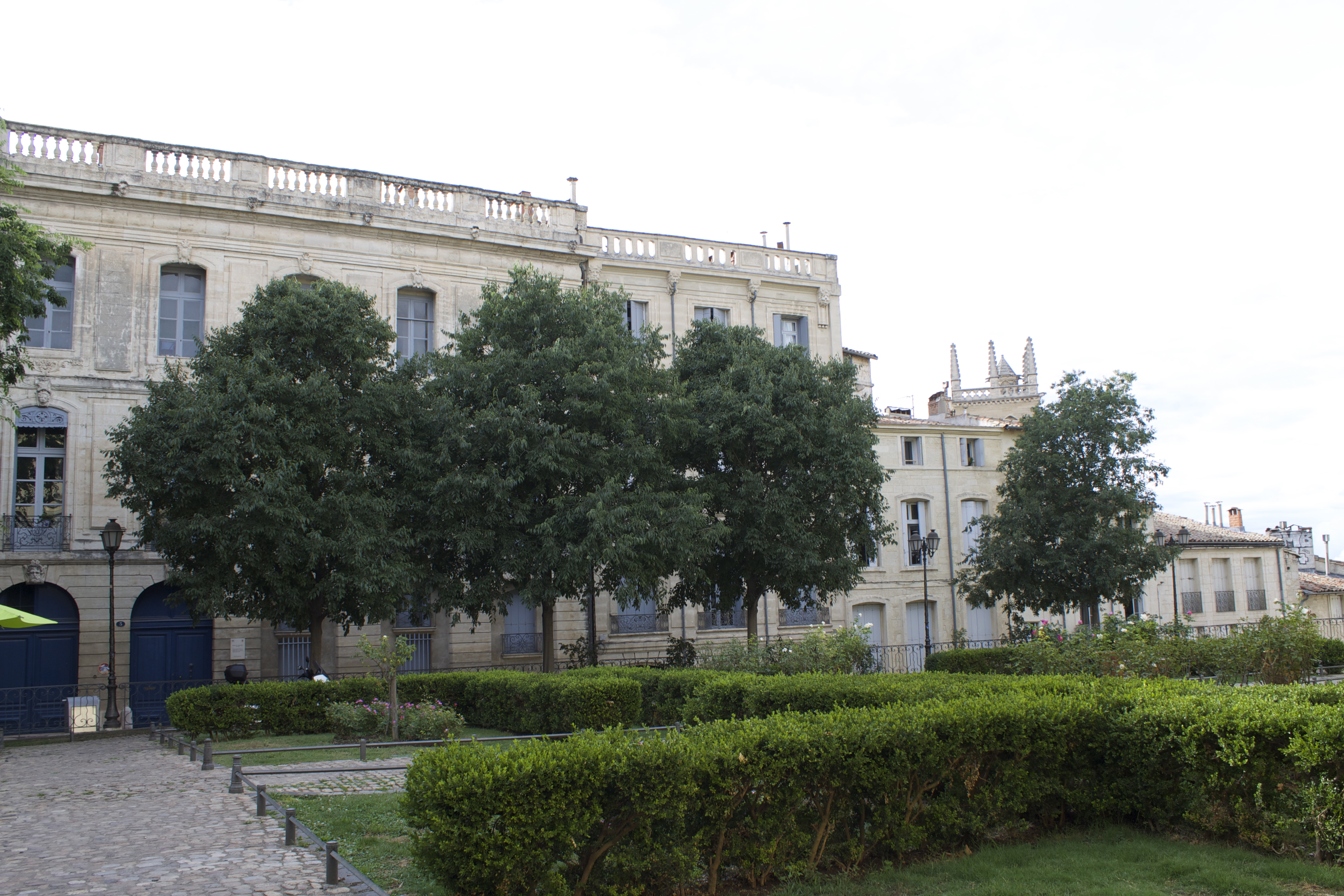 Montpellier, France